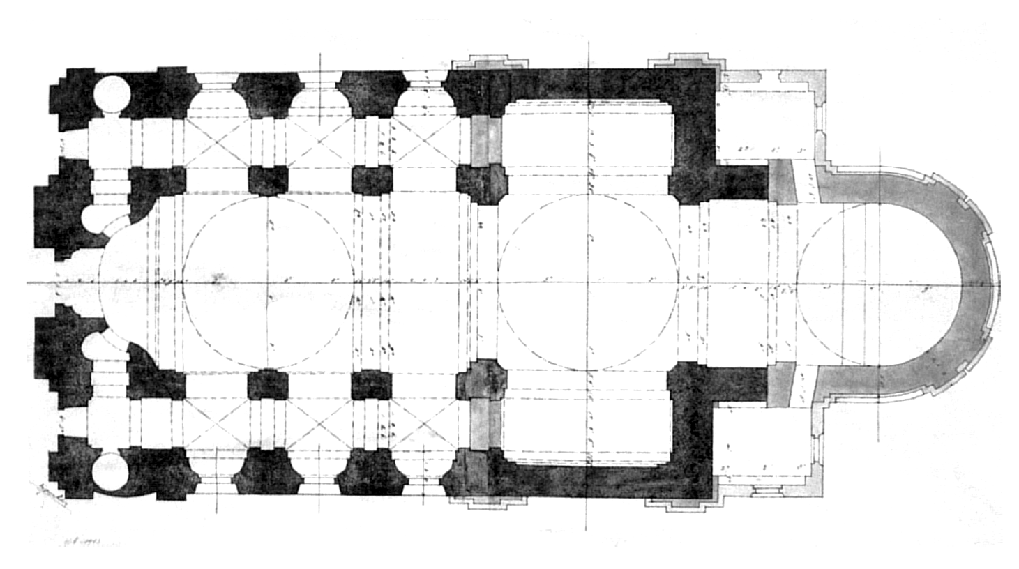 План перебудови тринітарського костелу на церкву Преображення Господнього.